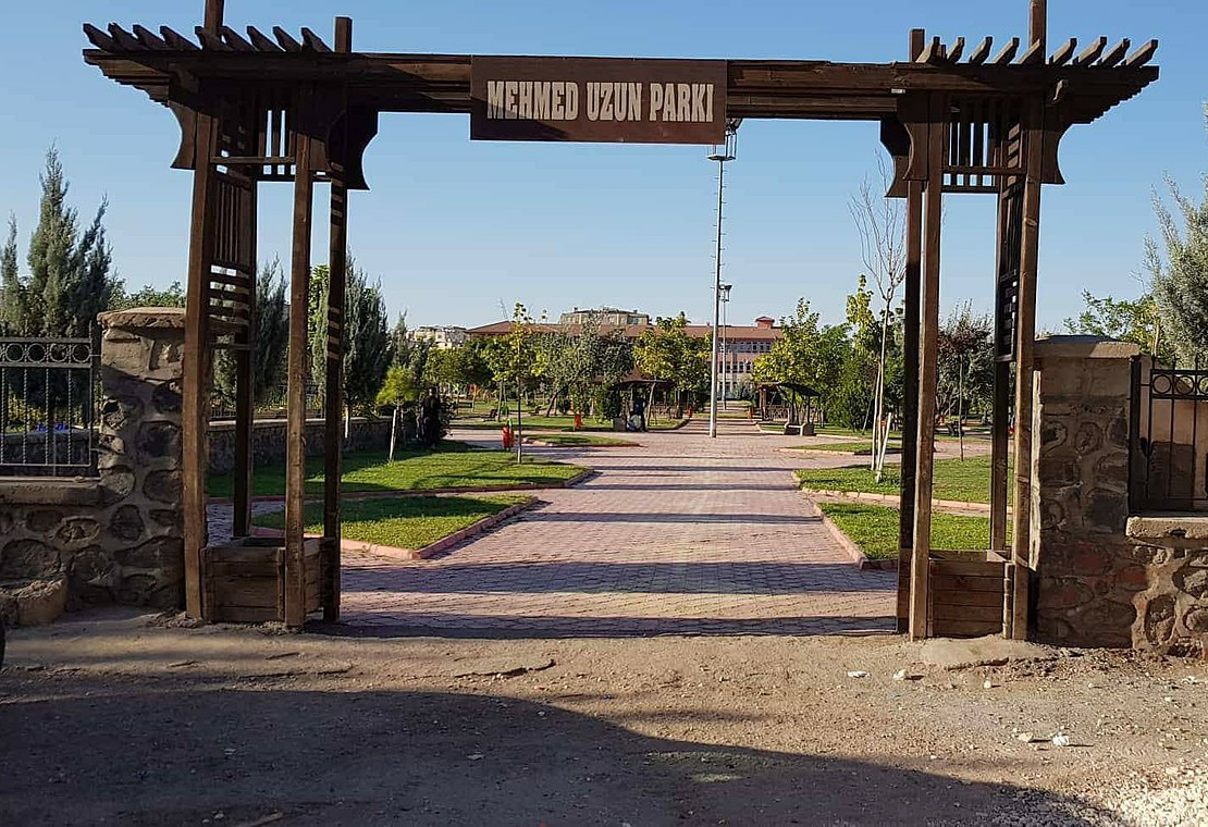 Mehmed Uzun Parkı'nın girişi. Diyarbakır.